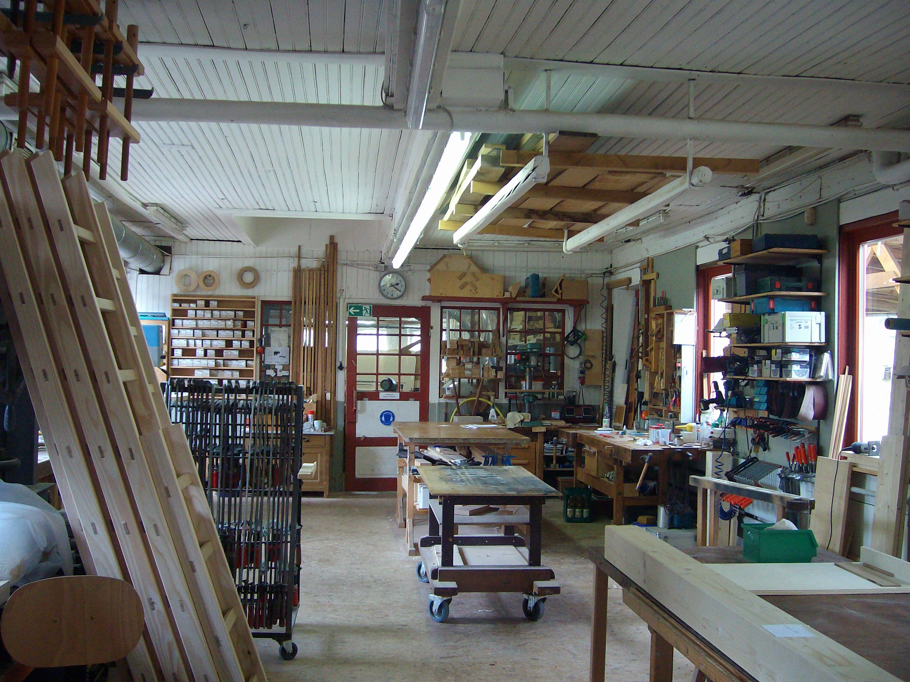 Werkstatt Förster & Nicolaus Orgelbau in Lich, Hessen